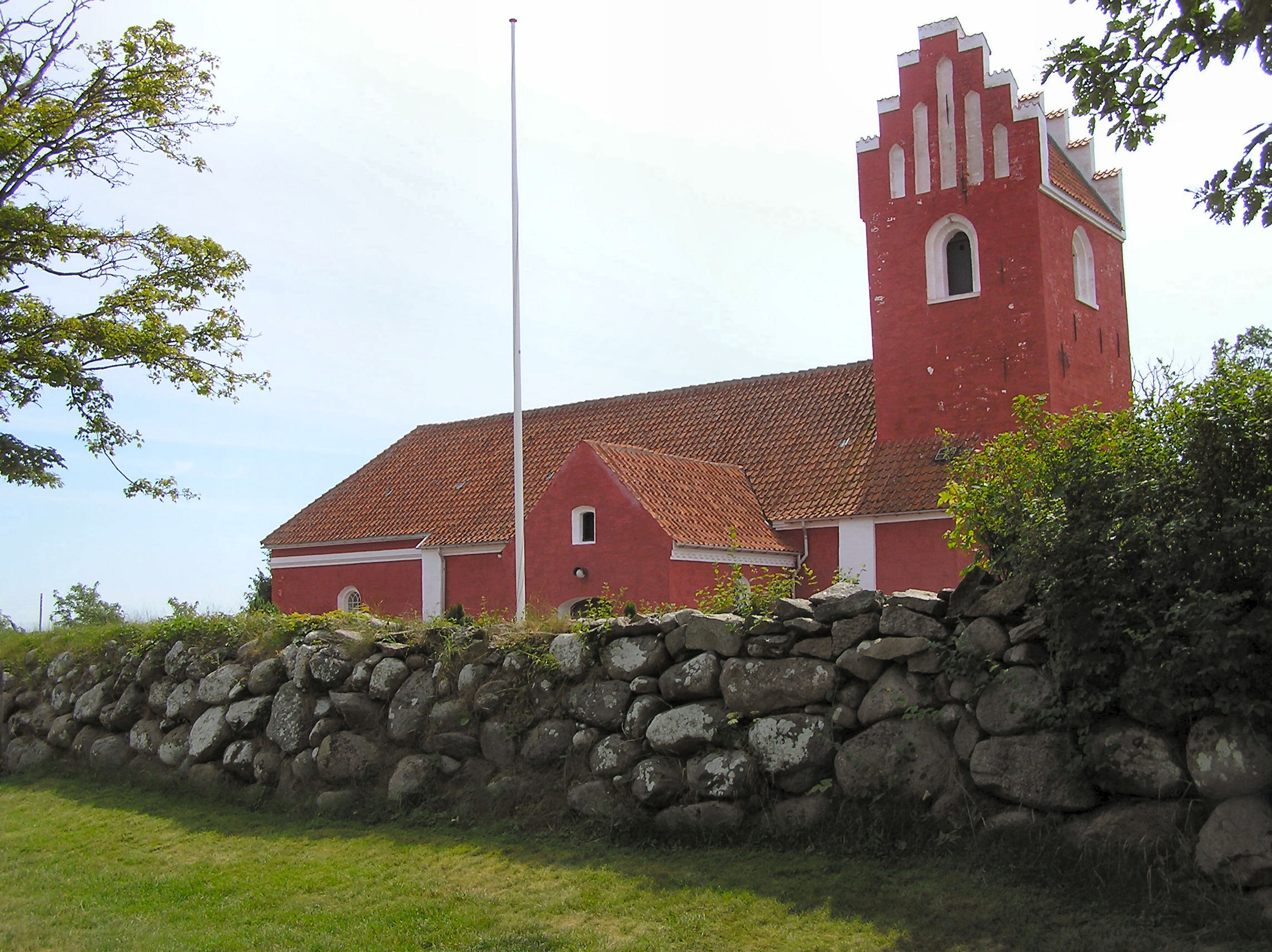 Vesterø Kirke, Læsø